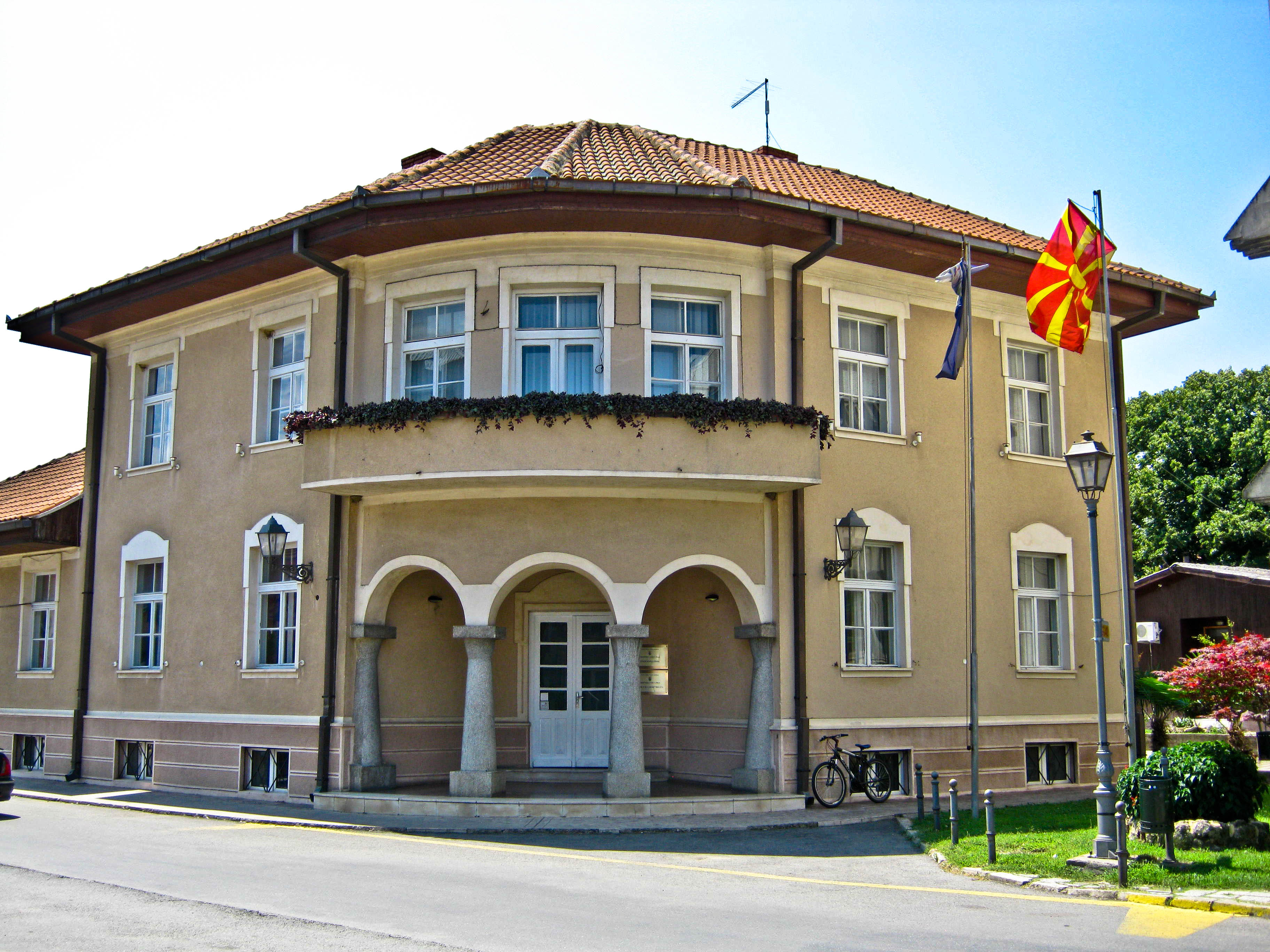 Општина Гевгелија